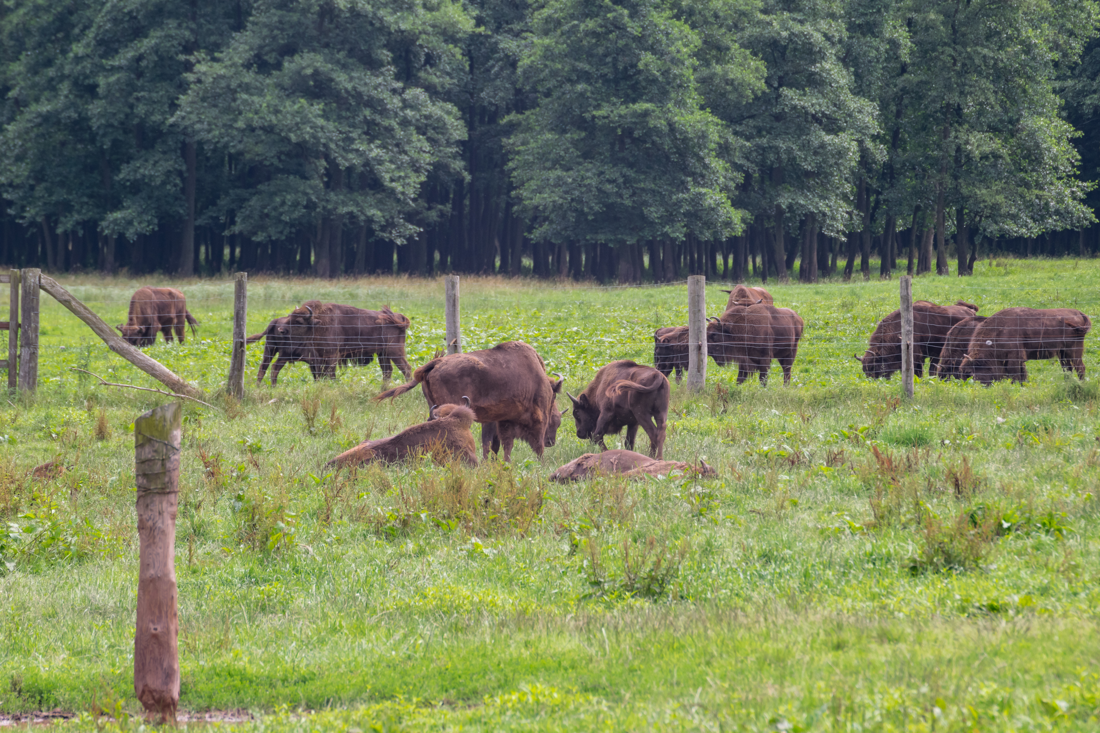 Bergwisente (genauer Mischform Bison bonasus caucasicus x Bison bonasus bonasus) im Wisentgehege Hardehausen bei Warburg